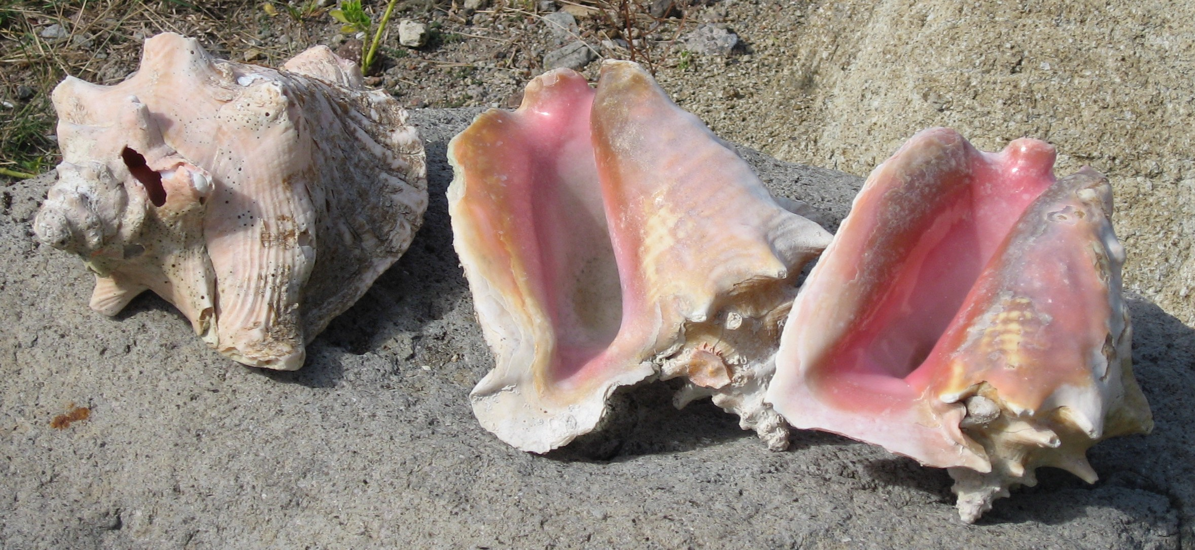 Eustrombus gigas (English) (Français) au Fort Napoléon en Guadeloupe, îlet Terre de haut-de-haut l'archipel Saintes